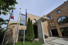 Siège du Groupe Soufflet